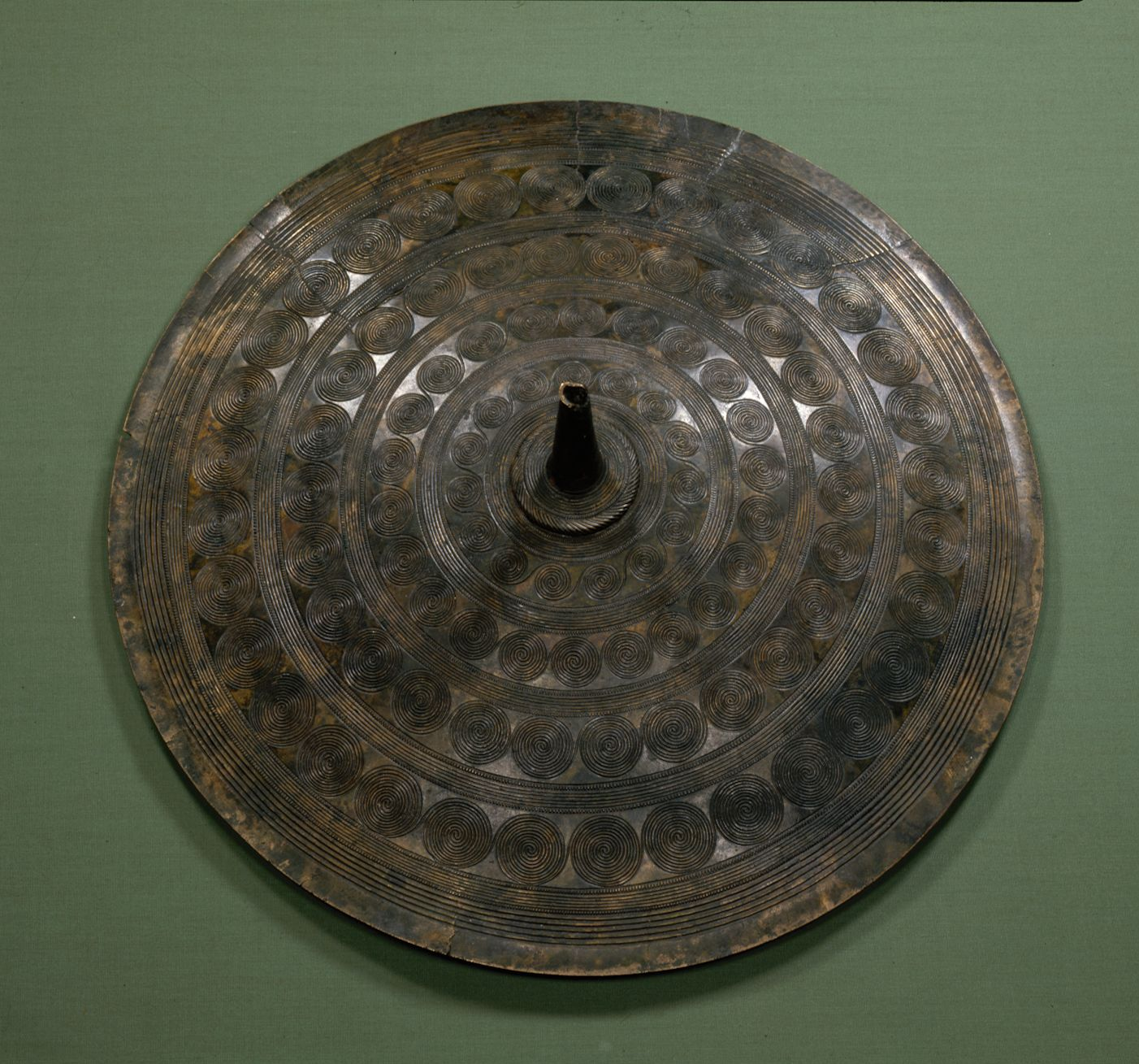 Bælteplade fra ældre bronzealder. Votiv/depot i mose